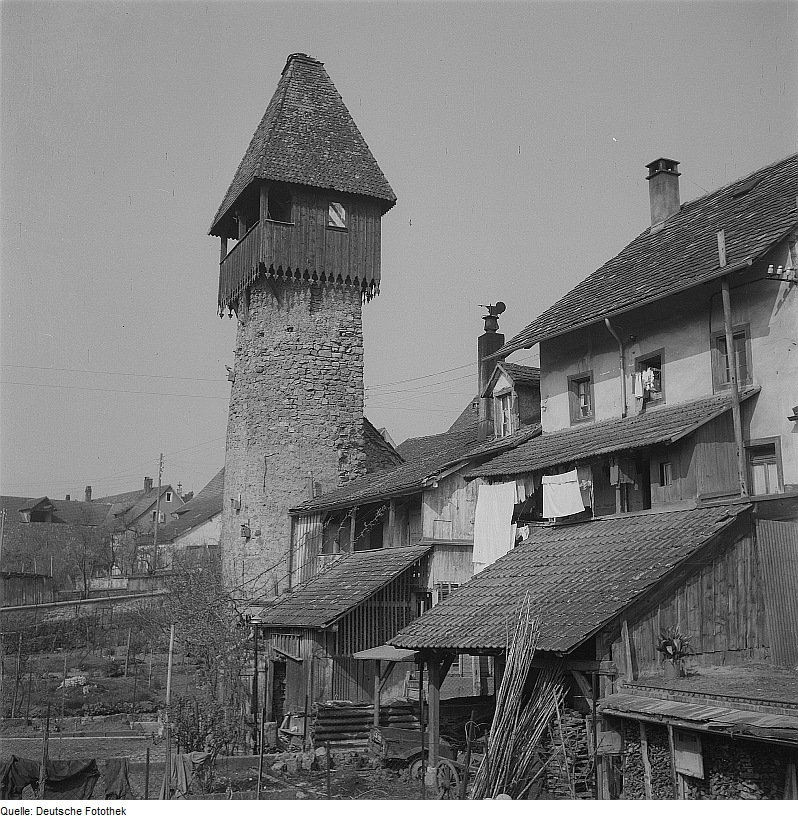 Original image description from the Deutsche Fotothek Tiengen (Hochrhein). Storchenturm